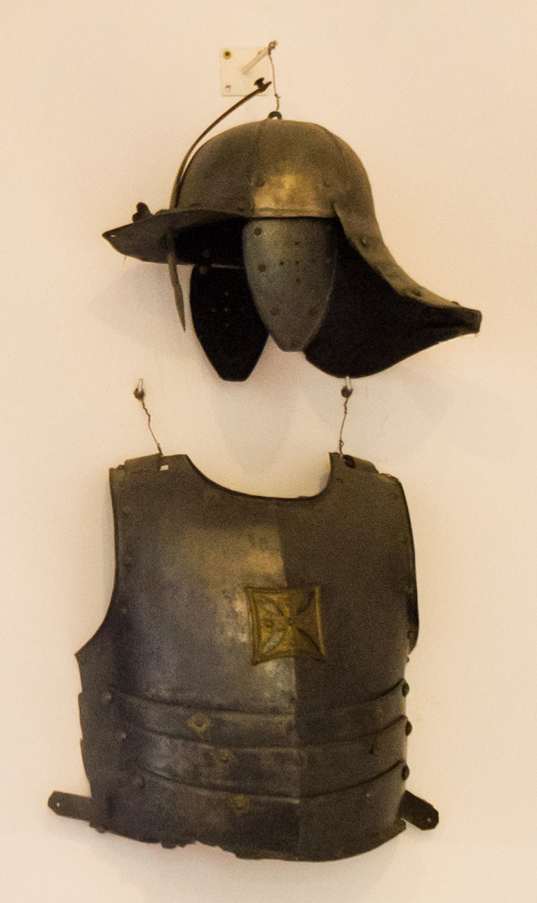 Szyszak i napierśnik husarski z XVII w. Miejsce pochodzenia - Polska. Miejsce ekspozycji - Muzeum Historyczne w Sanoku (nr inw. MHS/H/1668 i MHS/H/1669)